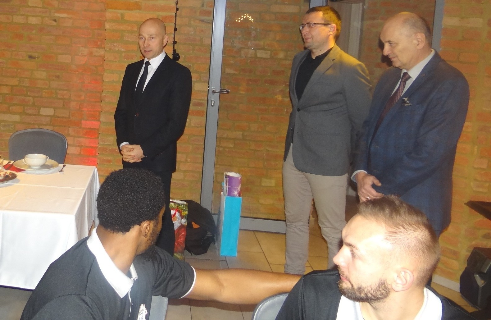 Spójnia Stargard, wigilia (20.12.2018)